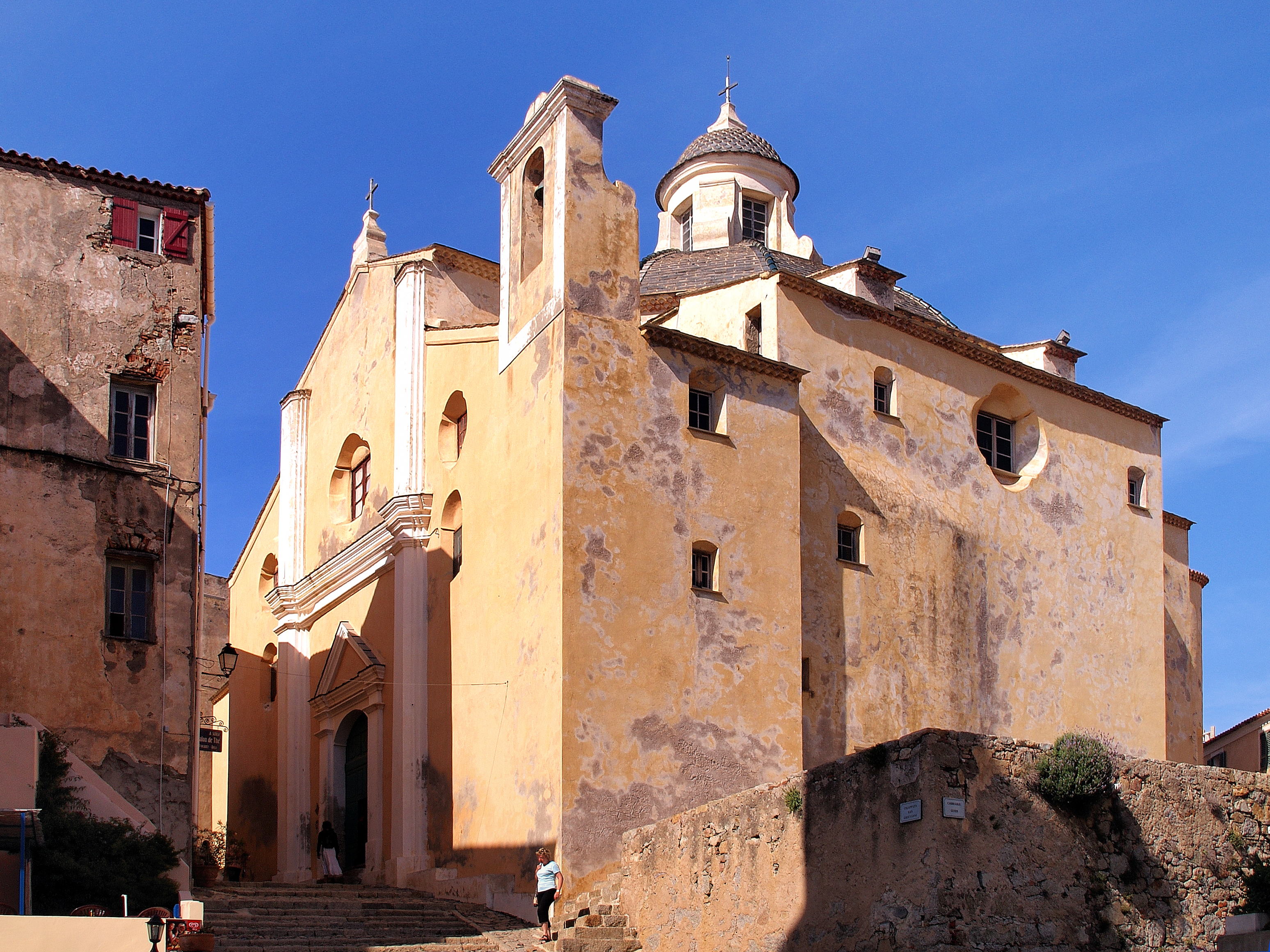 Calvi, Balagne (Corse) - Pro-cathédrale Saint-Jean Baptiste dans la citadelle